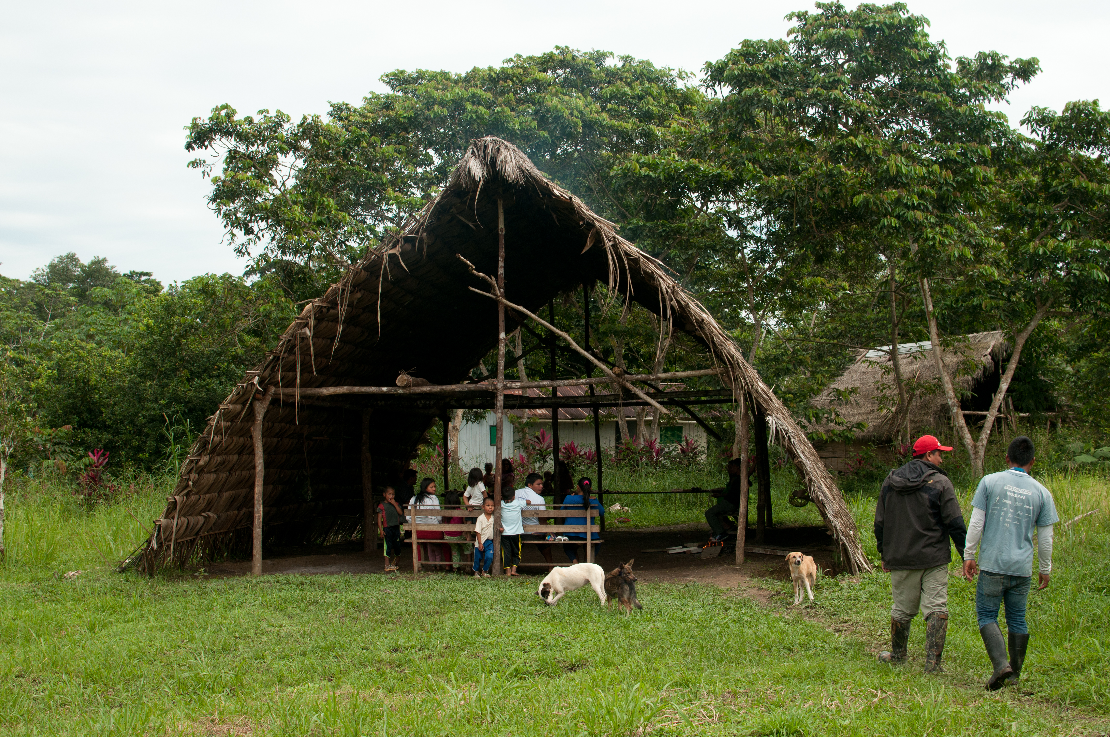 Traditionelles Langhaus als Versammlungsraum in einer modernen Huaorani-Communidad